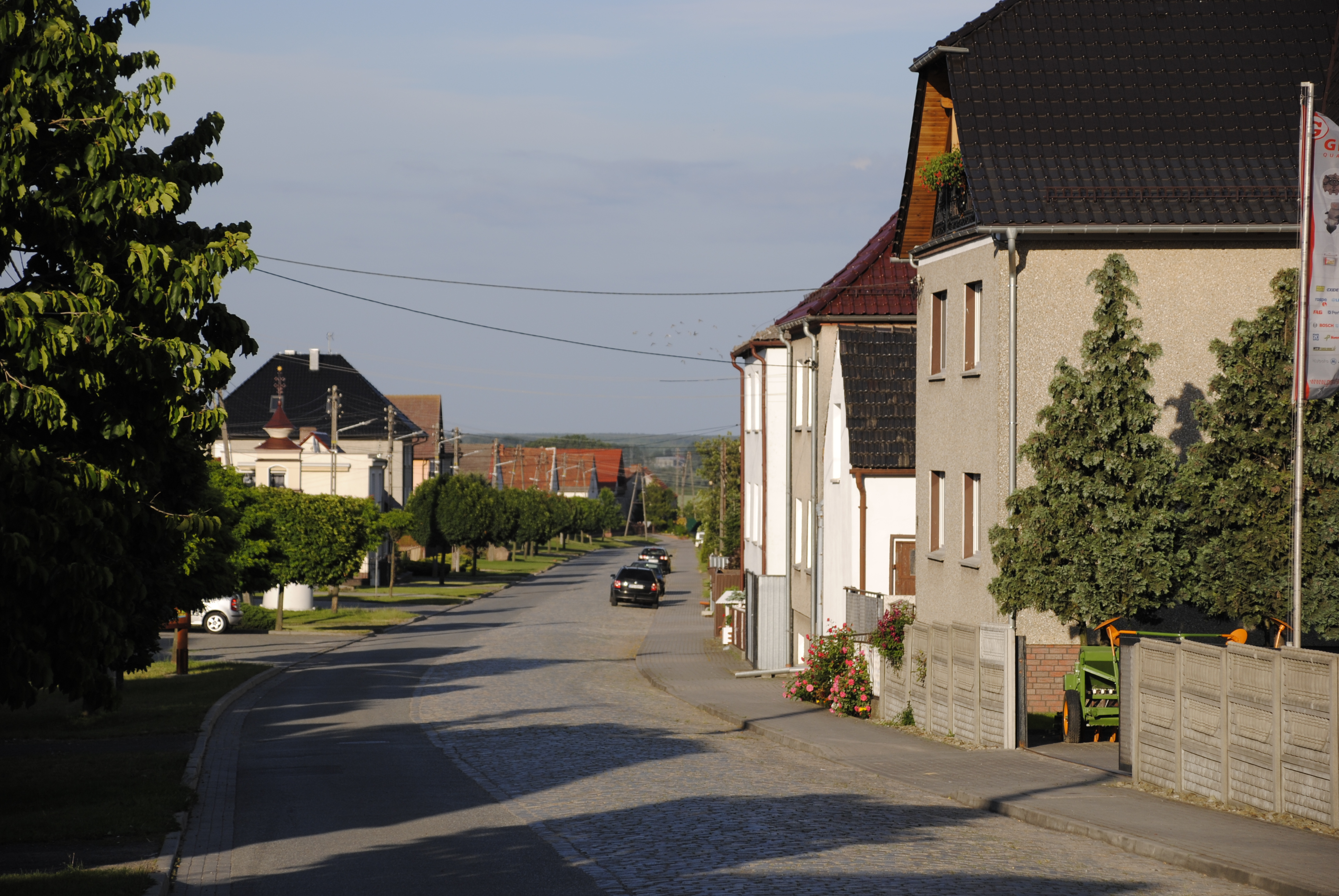 Blick in die ul. Jędrzejczyka in Zlönitz